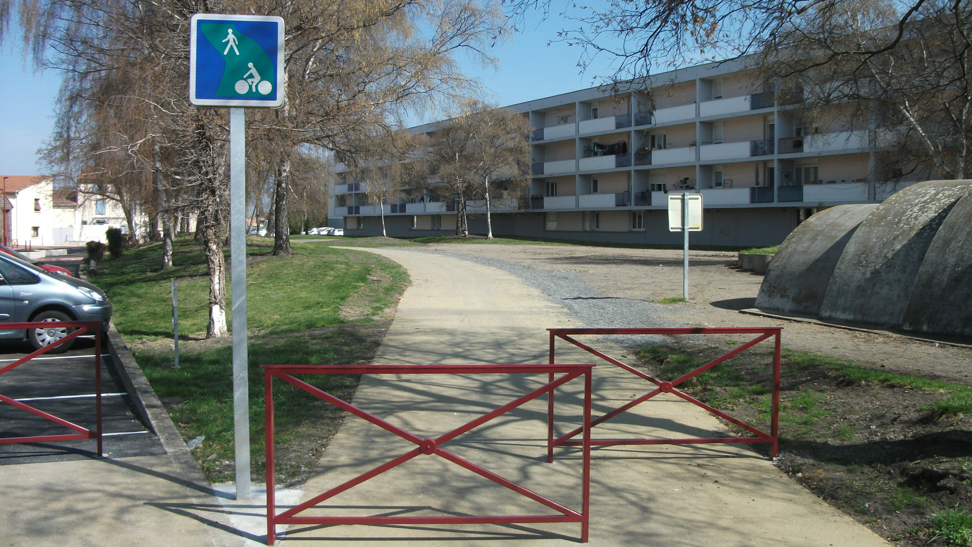 Début d'une voie verte (après l'avenue Pierre de Coubertin, à proximité de l'arrêt Pasteur Curie desservi par les bus des lignes 10 et 20 du réseau T2C), photo prise à Aulnat, Puy-de-Dôme, Auvergne, France – Girod 2011